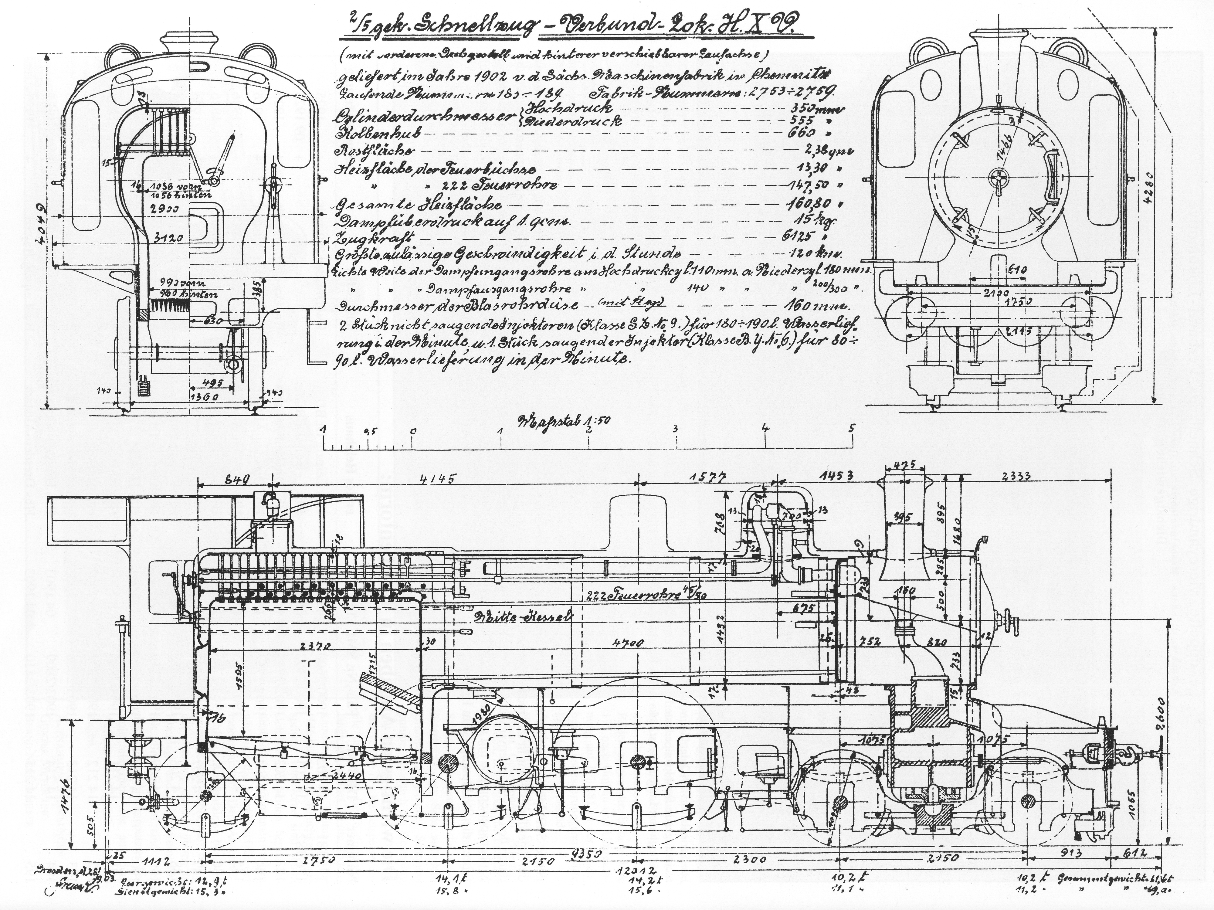 Musterblatt der Dampflokomotiven Sächsische X V des Werkstättenbüros der Königlich Generaldirektion für die Lokomotiven Nr. 183 bis 189 der zweiten Bauserie.